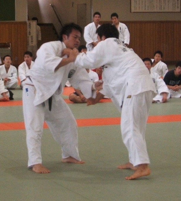 大学生の試合